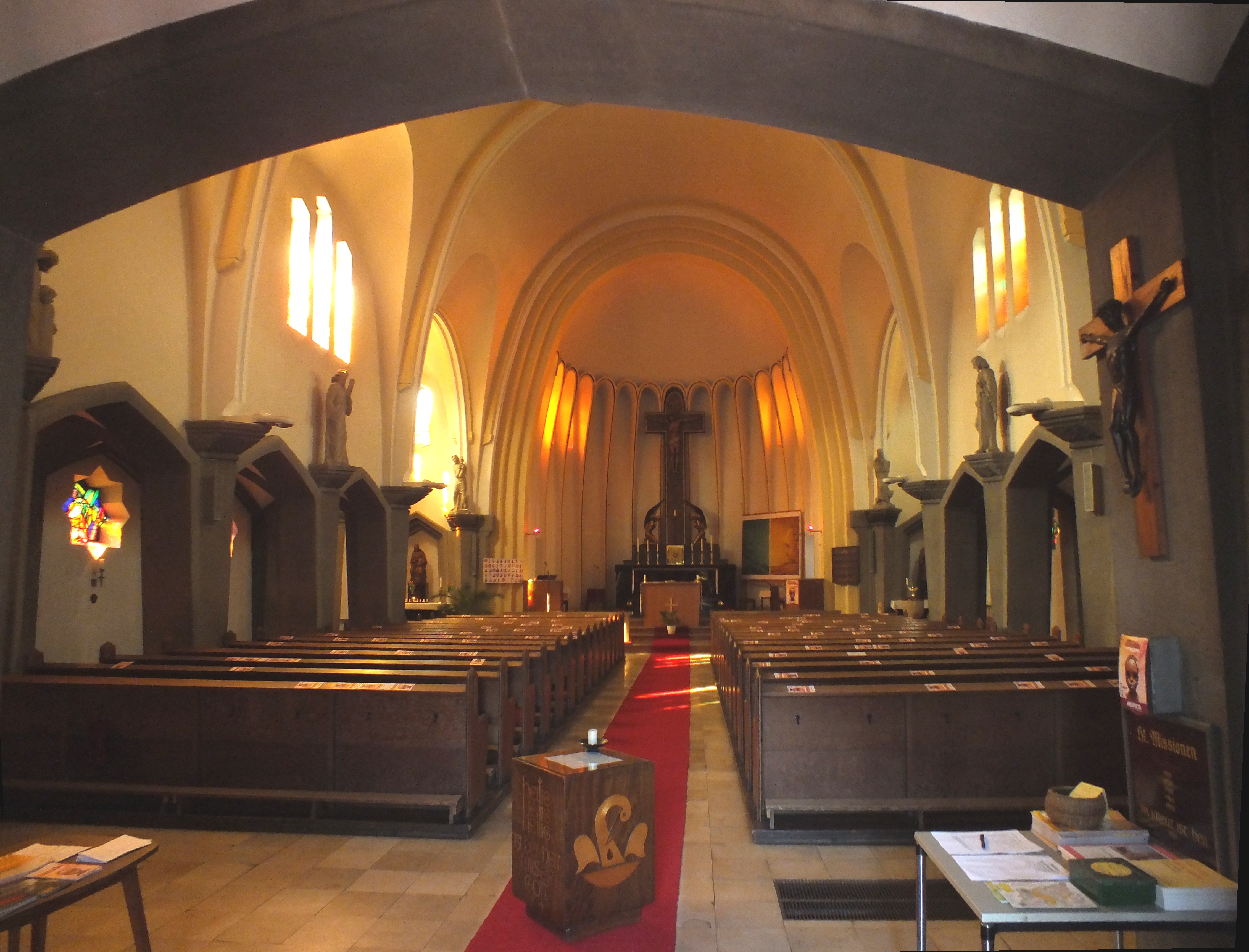 Kirche Maria Magdalena, Berlin-Niederschönhausen: Innen-Gesamtansicht Richtung Altar